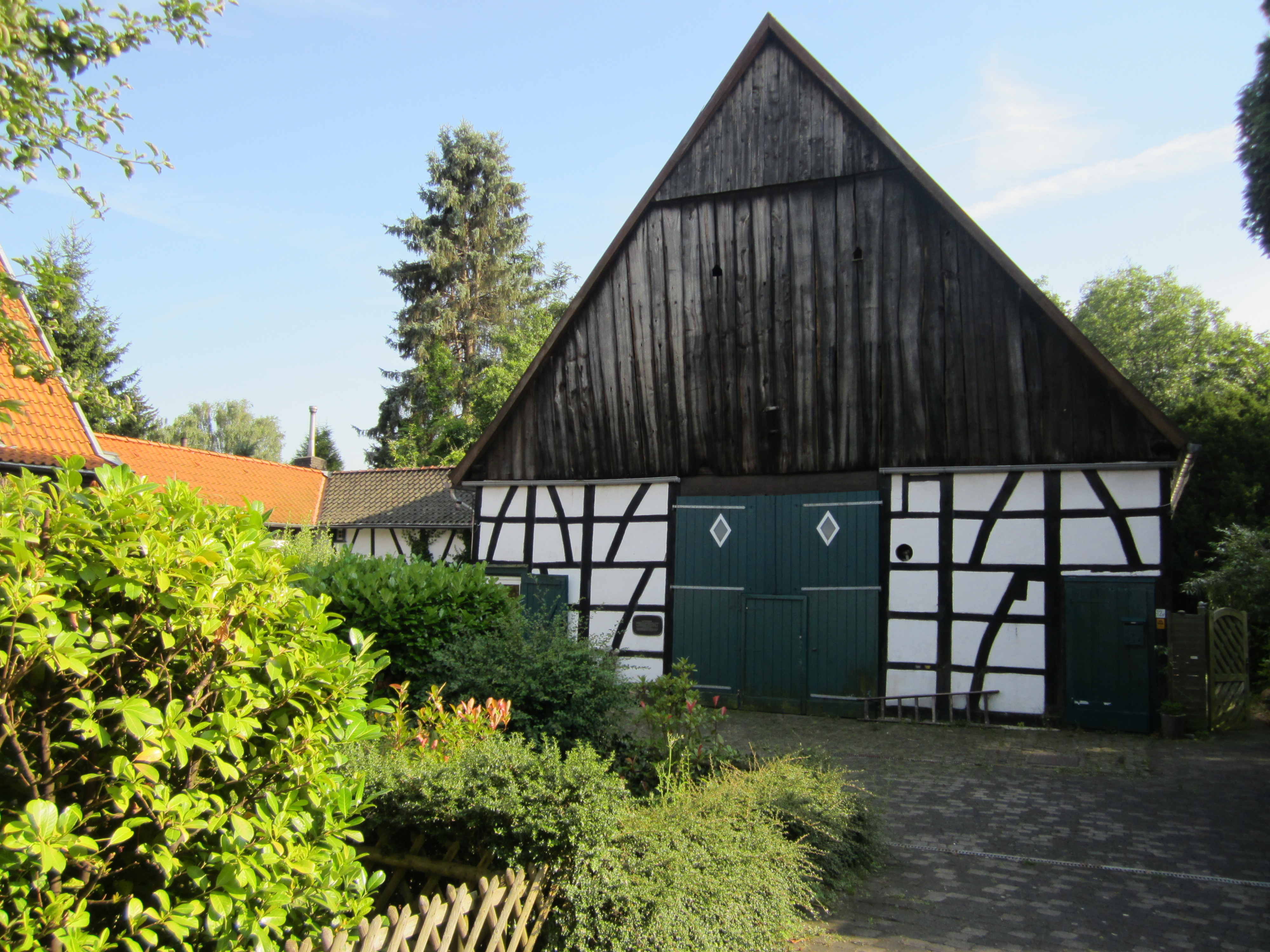 Dortmannshof in Essen-Katernberg